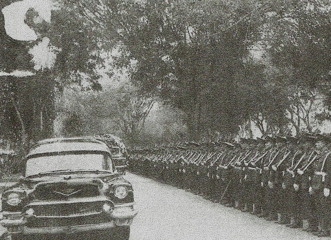 Vista Parcial de las honras fúnebres hechas en el entierro del General GC Fernando Rincón Jaramillo. En primer plano se ve la formación del Batallón de Guardias-Alumnos de la Escuela de Guardias del Centro de Instrucción de la Guardia Civil del Perú